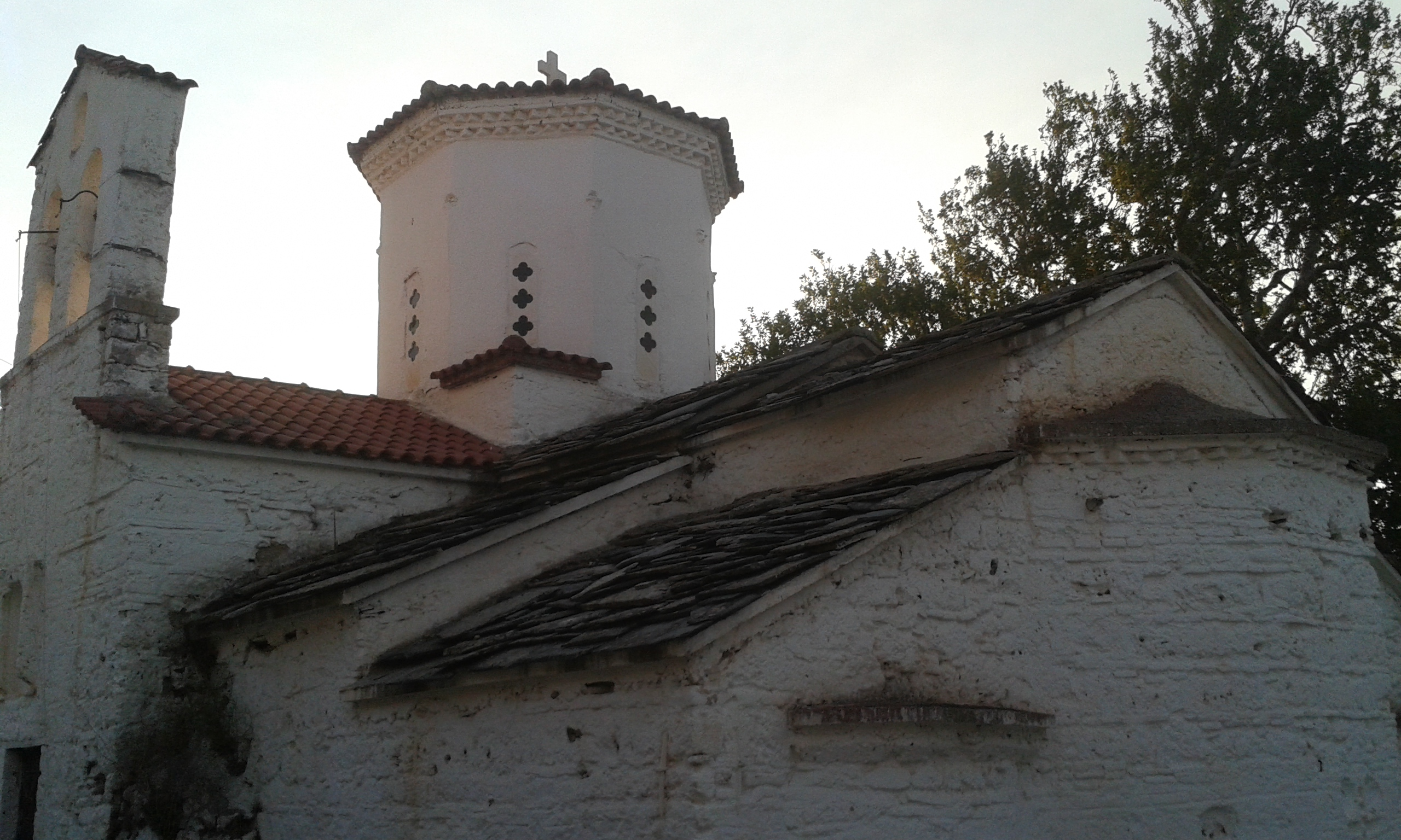 O ναός του Αγίου Ιωάννη Προδρόμου, στον Άγιο Ιωάννη Αρκαδίας Αδειοδότηση Το παραπάνω αρχείο διανέμεται υπό τις δύο παρακάτω άδειες χρήσης. Μπορείτε να επιλέξετε την άδεια της προτίμησής σας.